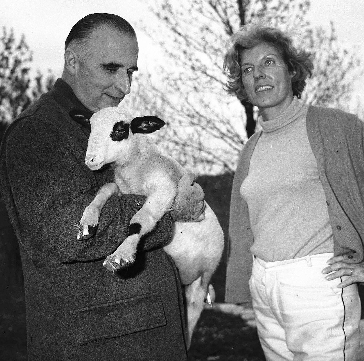 Cajarc (Lot). 17 Avril 1965. Vue de Georges Pompidou tenant une brebis dans ses bras avec sa femme à ses cotés.